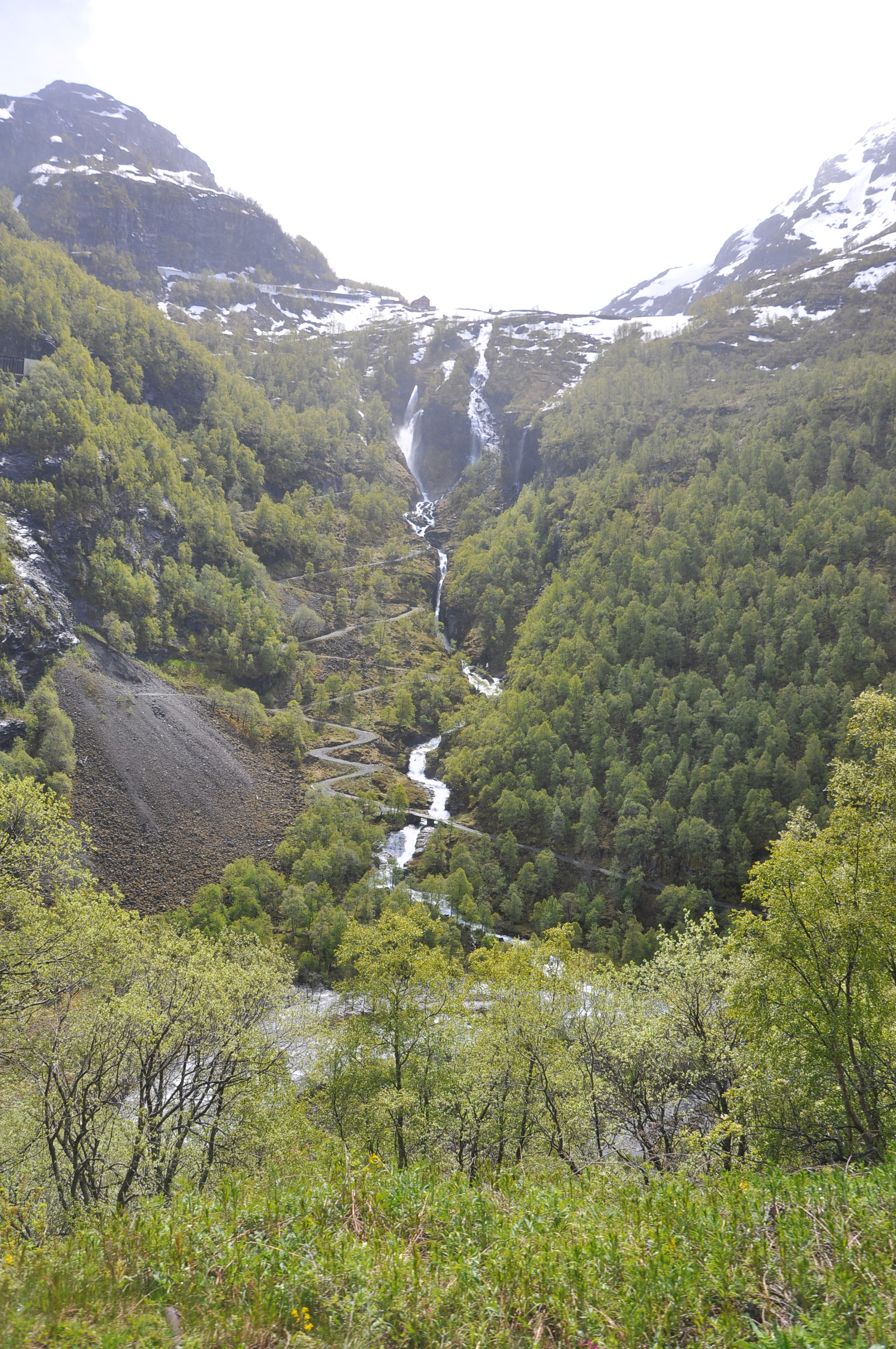 Myrdalsfossen frå Flåmsbana